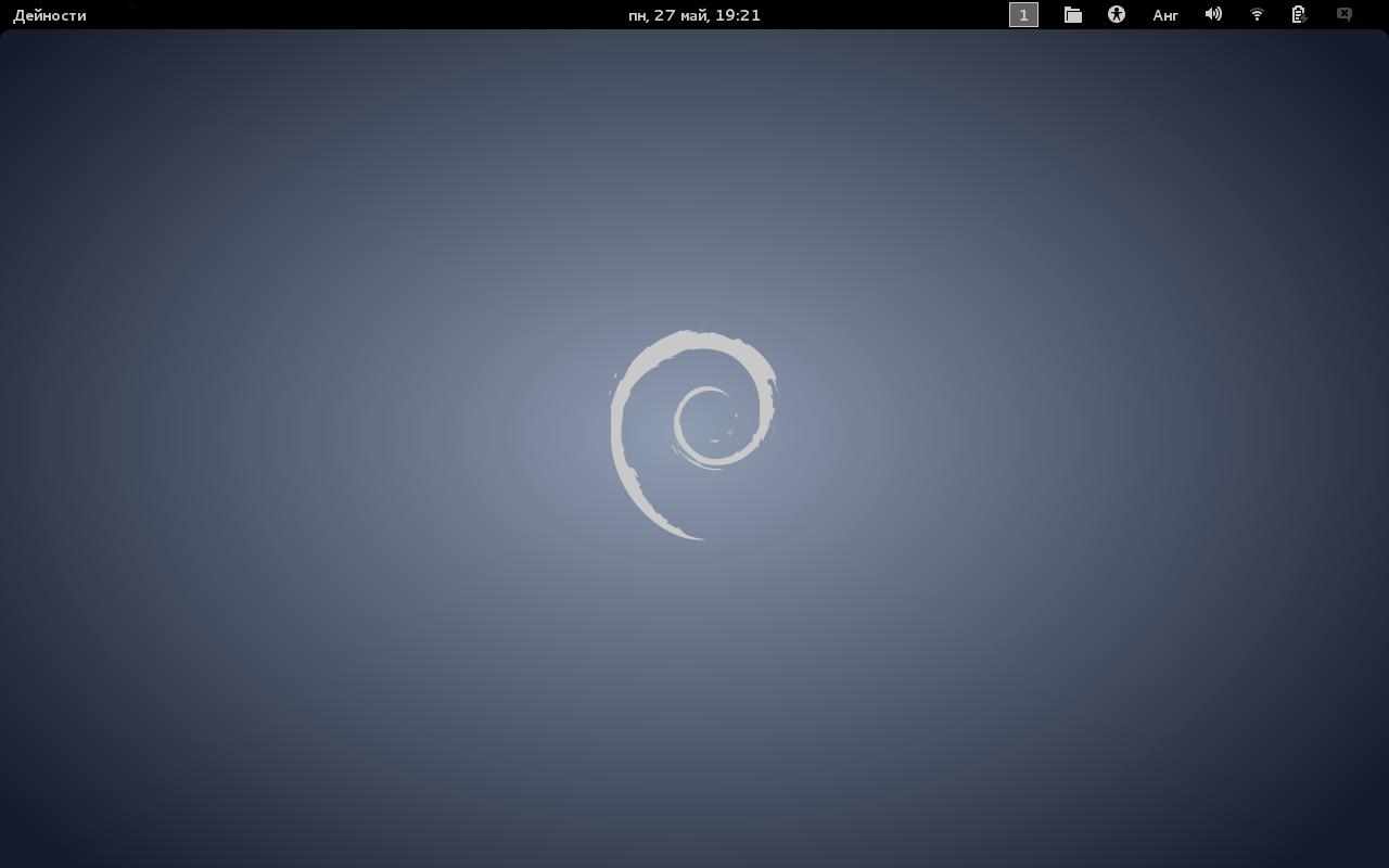 Работния плот на Debian 7